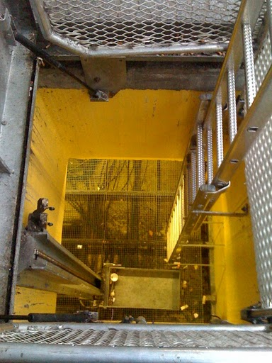 Bouche d'accès souterrain du Tramway T1, La Part-Dieu, Lyon (2009).